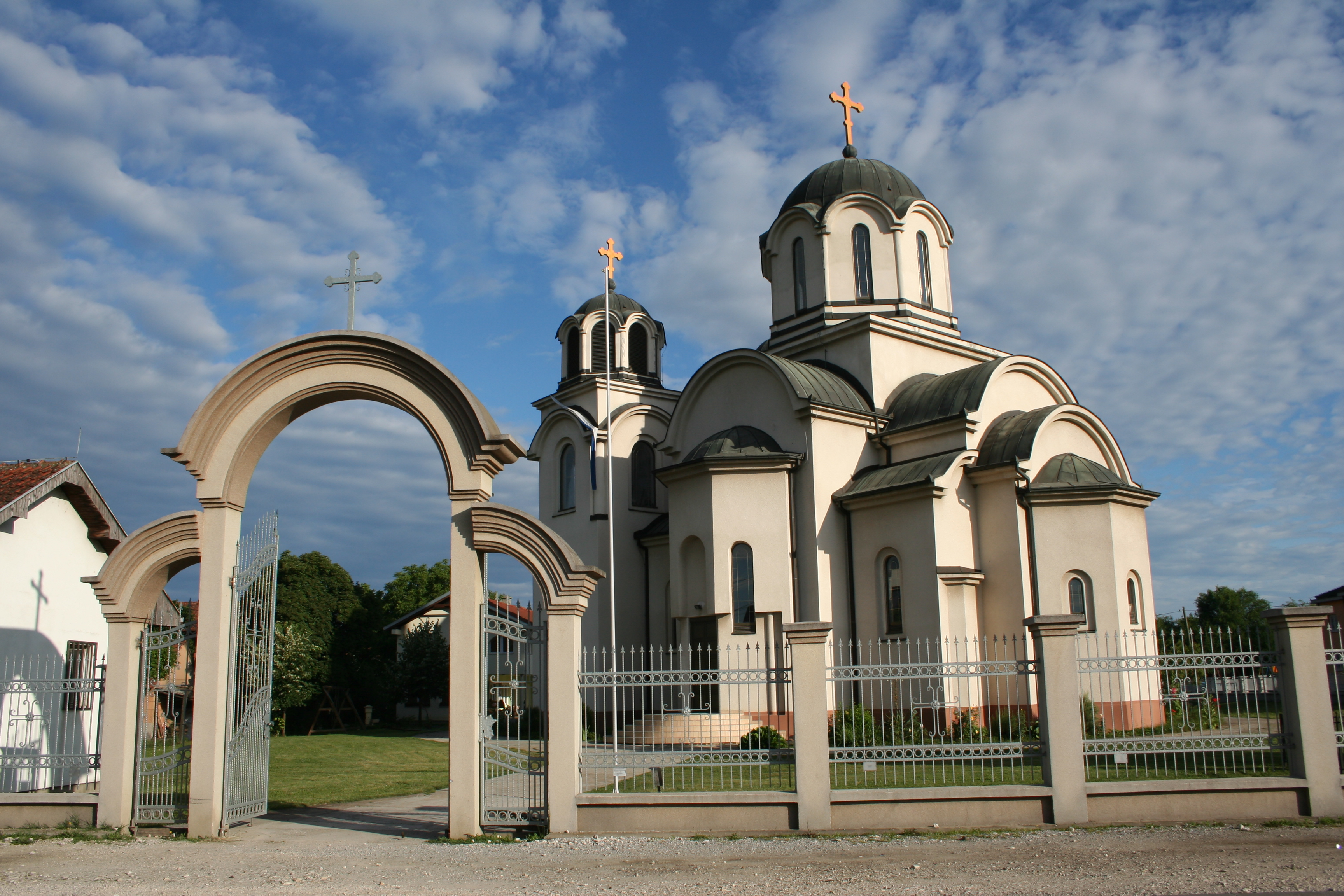 Crkva Svetog Vasilija Ostroškog u Kasarskim livadama